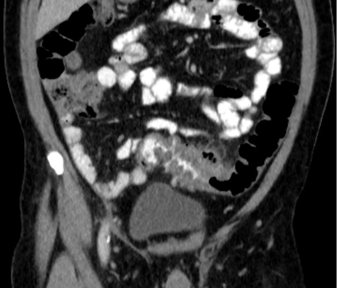 Sigmadivertikulitis in der Computertomographie (coronare Rekonstruktion). Man erkennt oberhalb des wandverdickten Bereichs etwas Gas, welches wohl nicht mehr intraluminal ist. Die Unterscheidung von Gas und Flüssigkeit (Pus) in einem langen Divertikel oder ausserhalb des Lumens als Zeichen der Perforation ist oft schwierig und nicht sicher zu treffen.